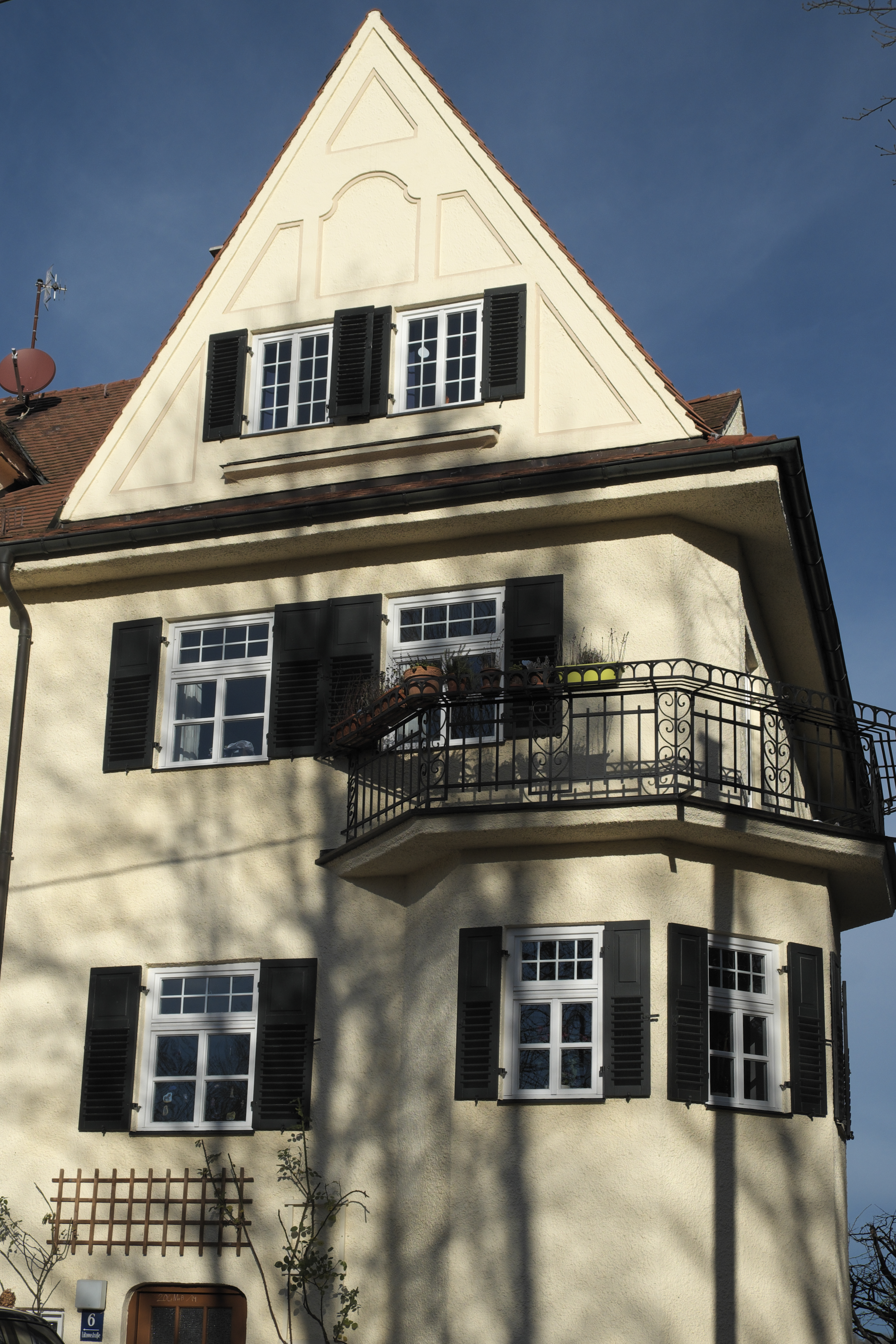 Wohnhausgruppe in der Lützowstraße 6 in Obermenzing im Stadtbezirk Pasing-Obermenzing in München (Bayern/Deutschland)